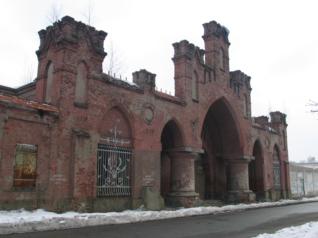 Beczki Grohmana są symbolem całego przedsiębiorstwa Grohmana